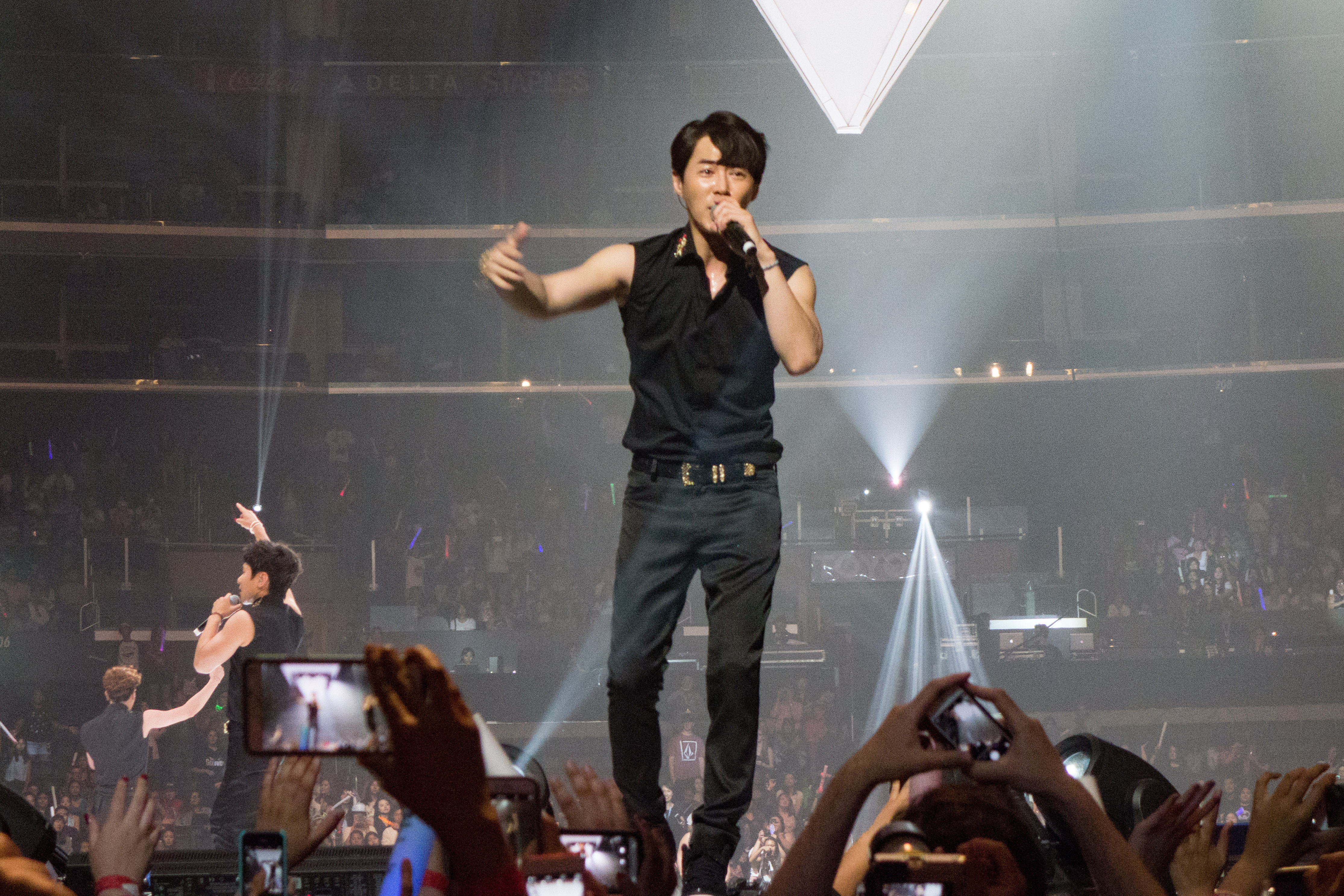 KCON 2015